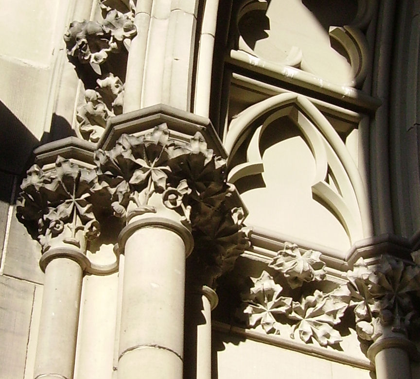 Gedächtniskirche (Memorial Church) in Speyer, Germany